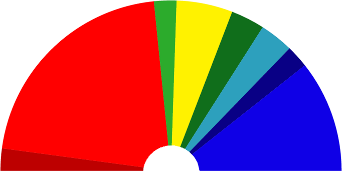 Mandatfördelning i landstinget Blekinge 2010-2014 Vänster-Höger Vänsterpartiet: 2 mandat Socialdemokraterna: 20 mandat Miljöpartiet: 2 mandat Sverigedemokraterna: 5 mandat Centerpartiet: 3 mandat Folkpartiet: 3 mandat Kristdemokraterna: 2 mandat Moderaterna: 10 mandat